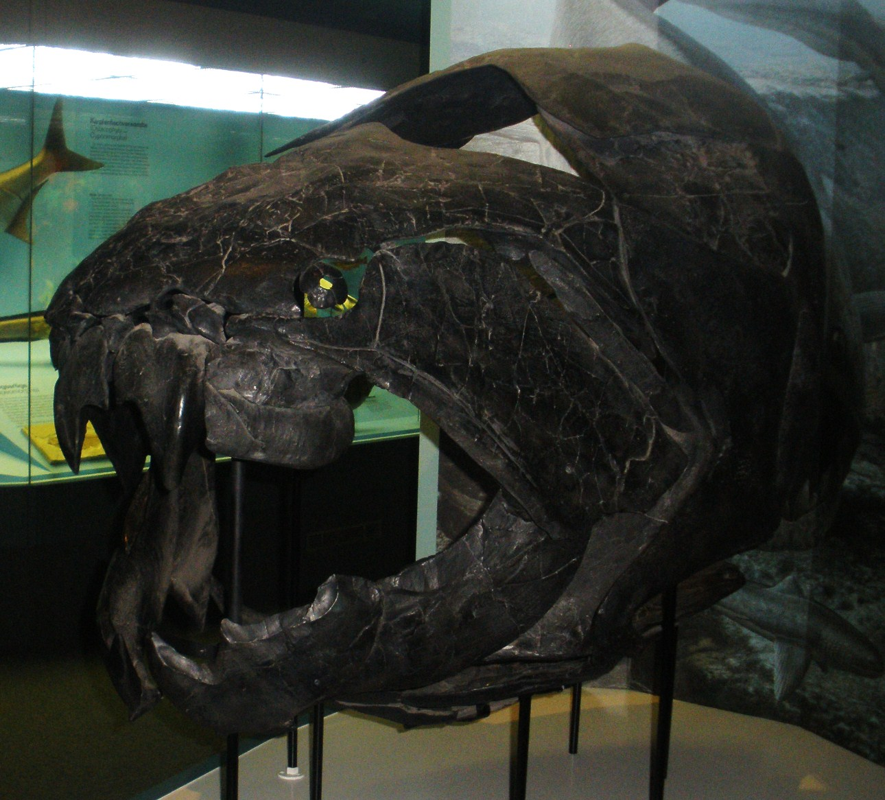 Fossil of Dunkleosteus, an extinct fish- Took the photo at Senckenberg Museum of Frankfurt